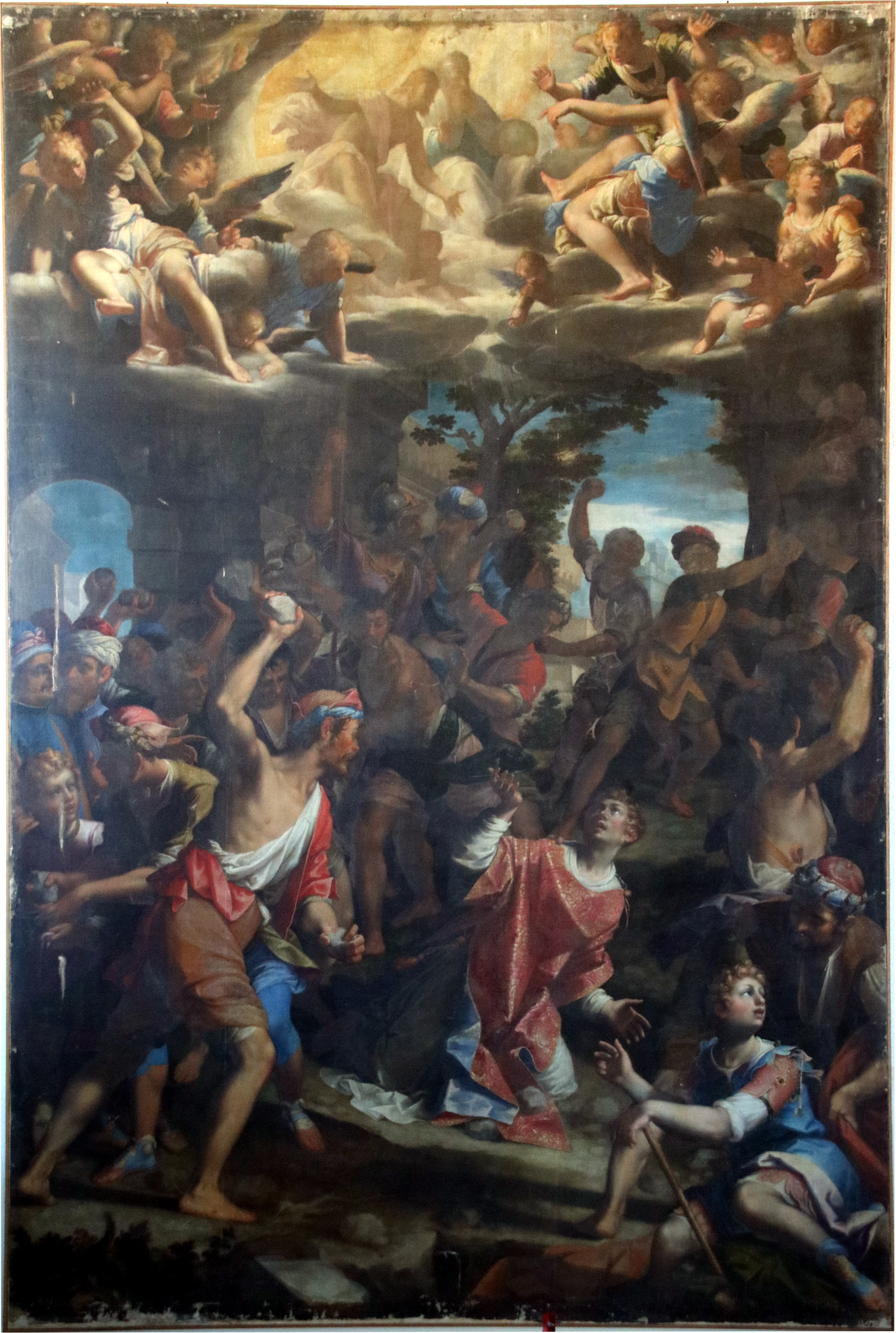 museo di Sant'Agostino This is a photo of a monument which is part of cultural heritage of Italy.